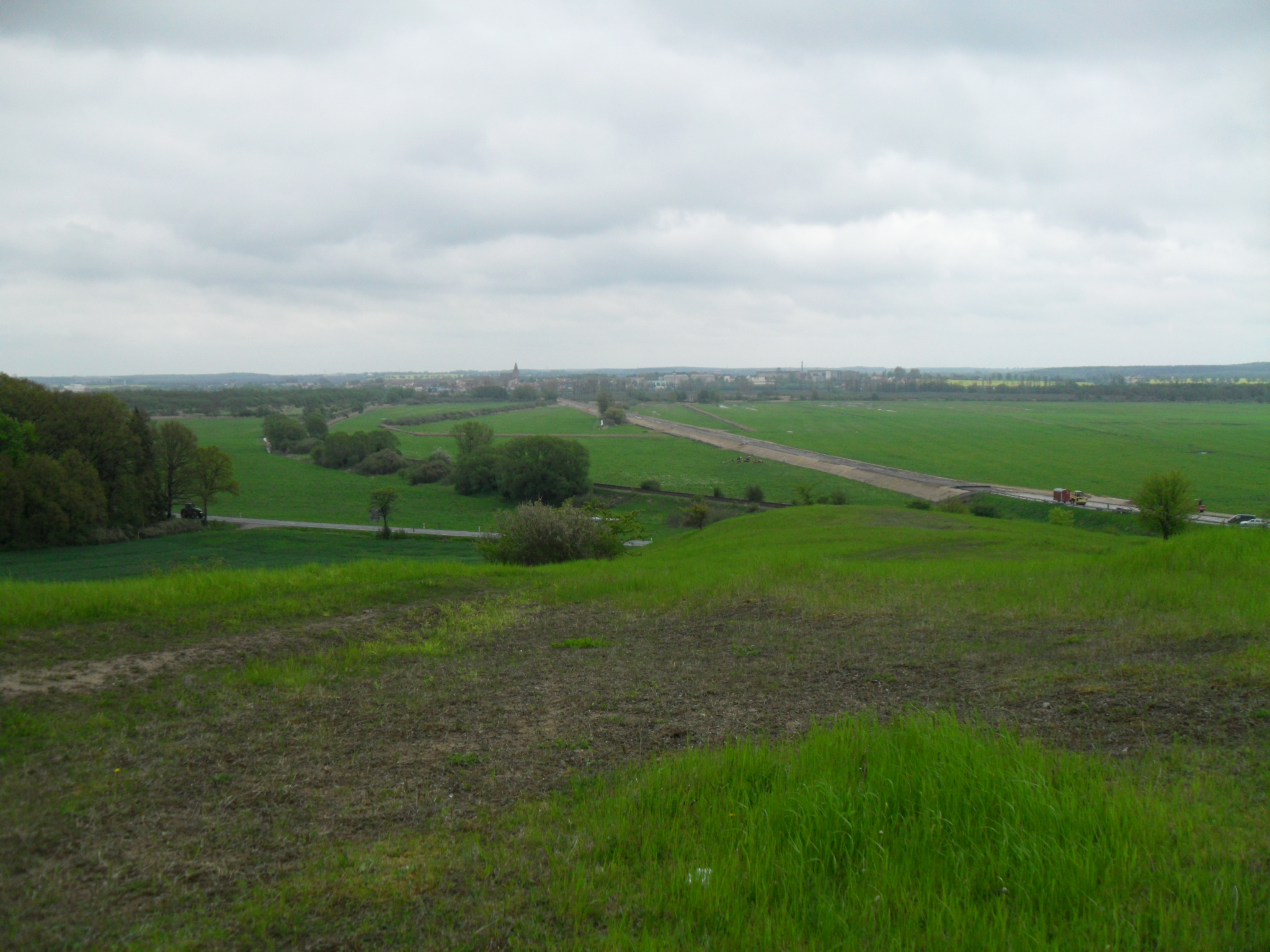 Blick vom Bornberg im Ostteil des Naturschutzgebiets „Stauchmoräne nördlich Remplin“ in Mecklenburg-Vorpommern. Im Hintergrund ist Malchin zu erkennen.